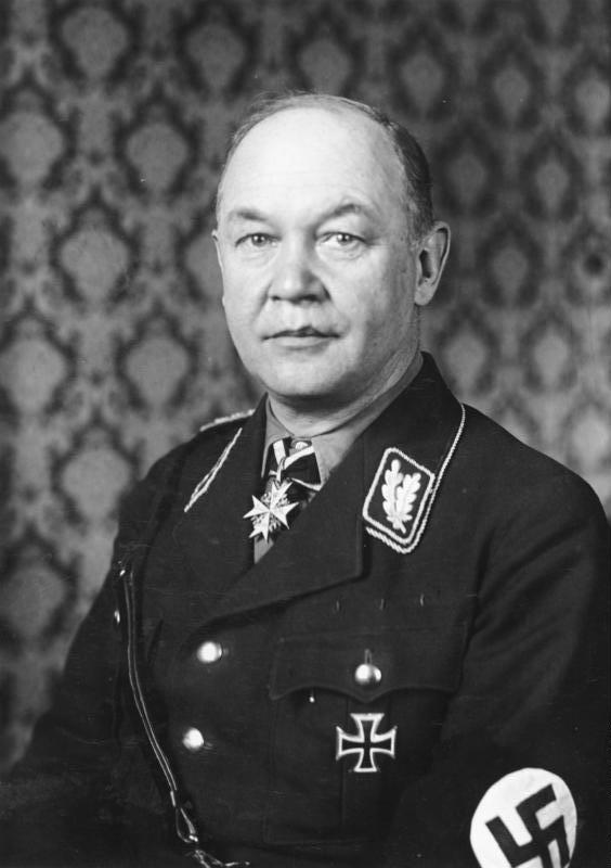 Achim von Arnim Scherl: von Arnim, Professor für Wehrwissenschaft an der Technischen Hochschule in Berlin-Charlottenburg, SA-Oberführer (Aufnahme 1934) [Porträt Achim Konstantin Rudolf Ferdinand von Arnim in Uniform als SA-Oberführer mit Orden] Abgebildete Personen: Arnim, Achim Konstantin R. F. von Prof. Dr.: SA-Oberführer, Rektor der Technischen Hochschule Berlin-Charlottenburg, Deutschland